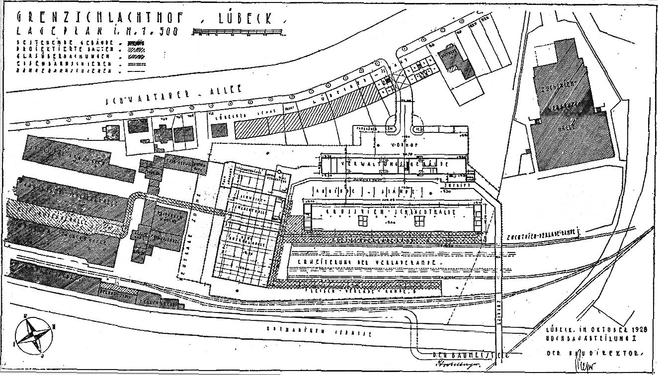 Lageplan des Seegrenzschlachthofs.